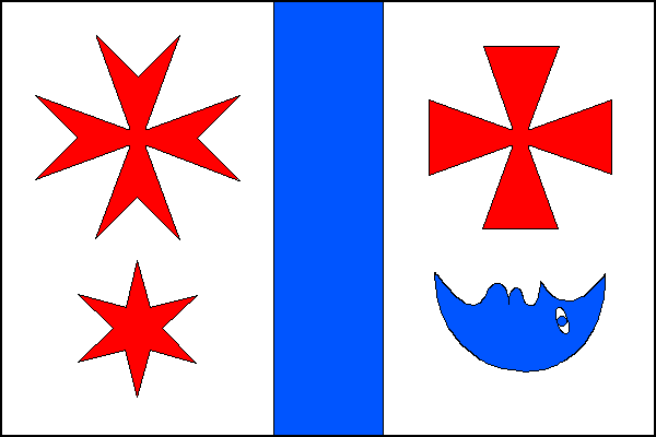 vlajka, Mašovice, okres Znojmo